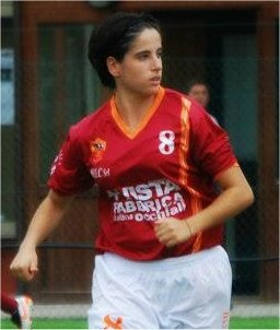 Claudia Ciccotti in azione con la maglia della Res Roma. Foto scattata privatamente da una mia amica durante un'amichevole (è come se l'avessi fatta io).